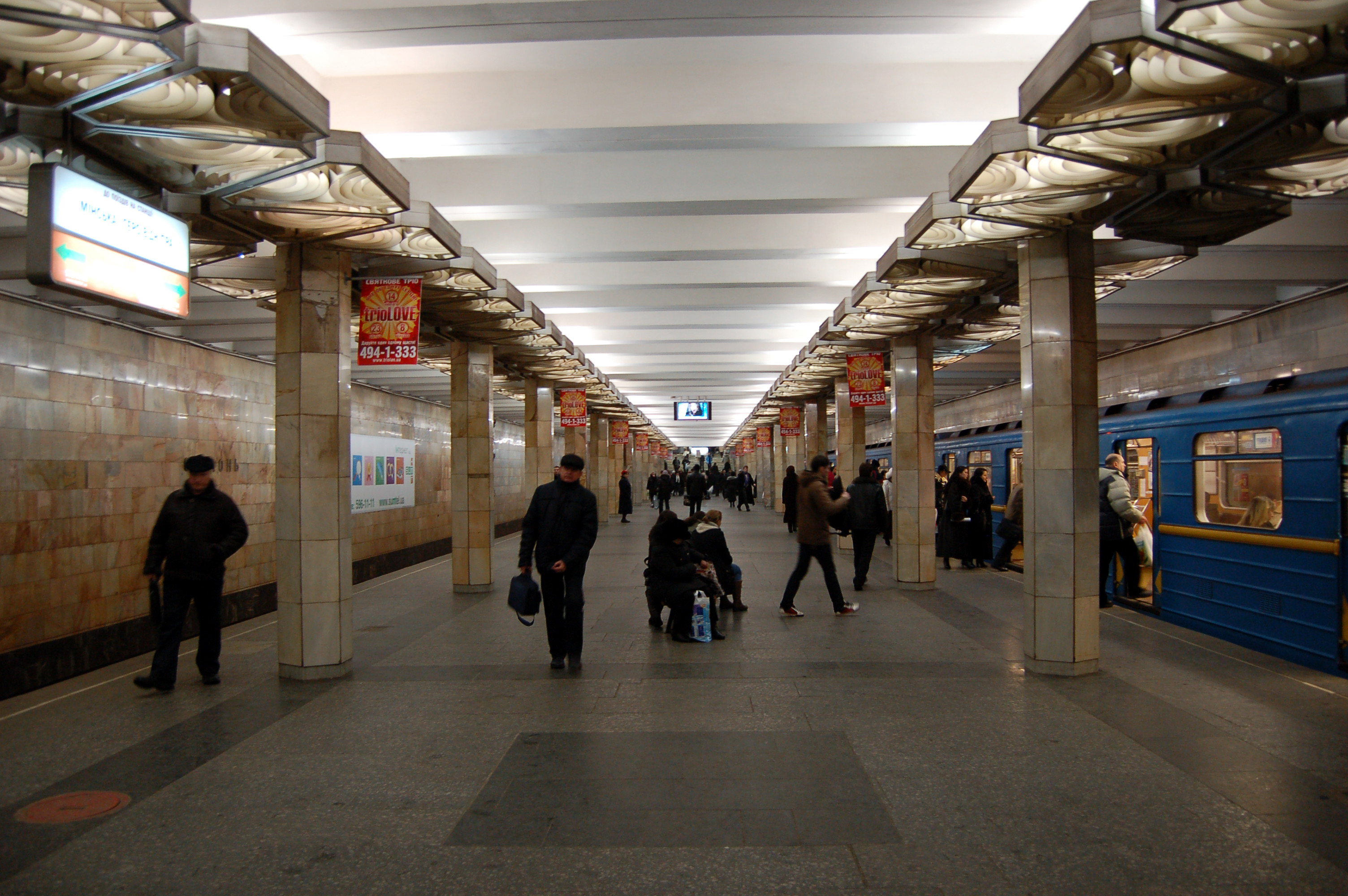 Станция метро «Оболонь», интерьер станции